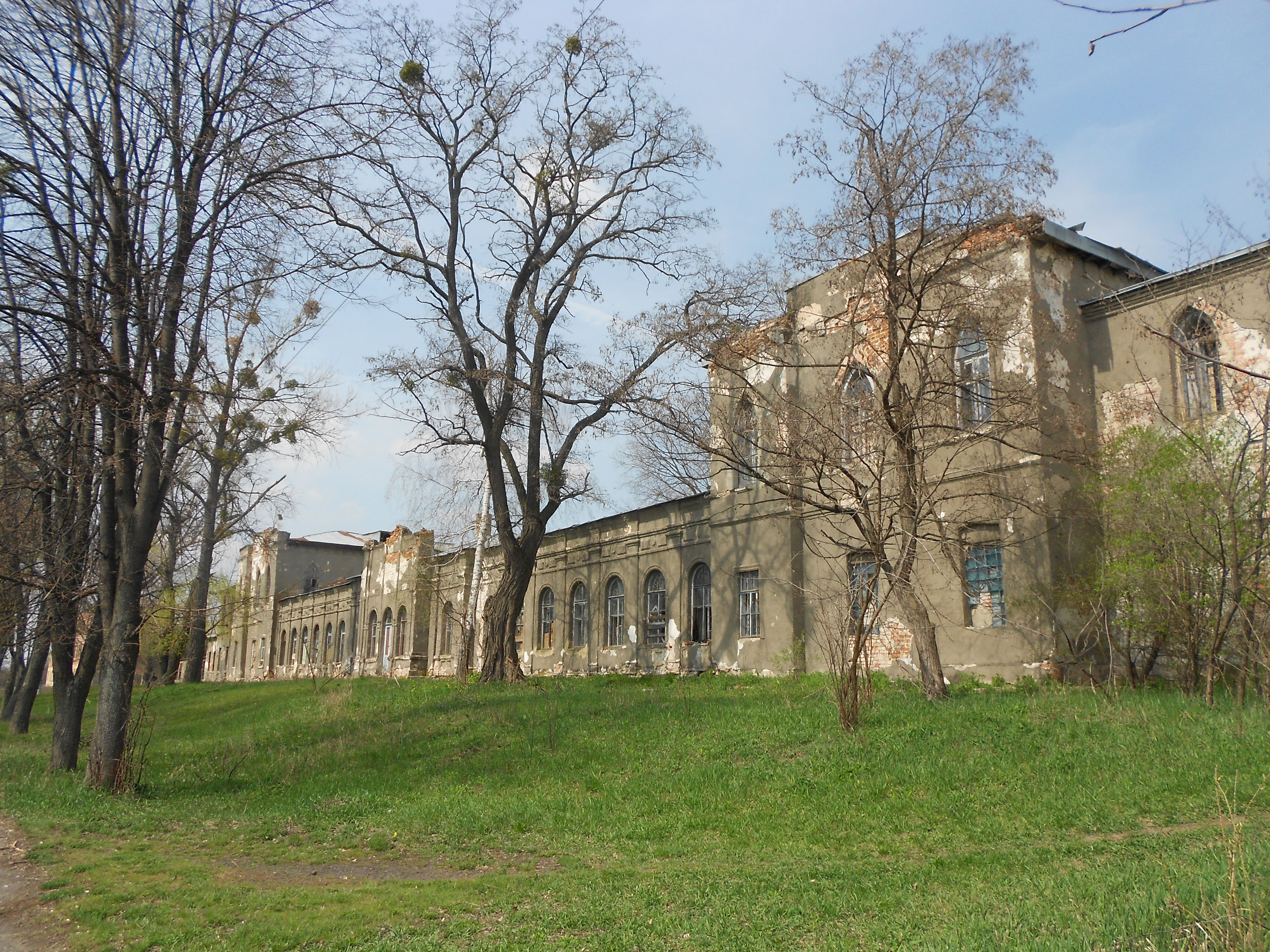 Палац (мур.), Люботин, пл.Жовтнева